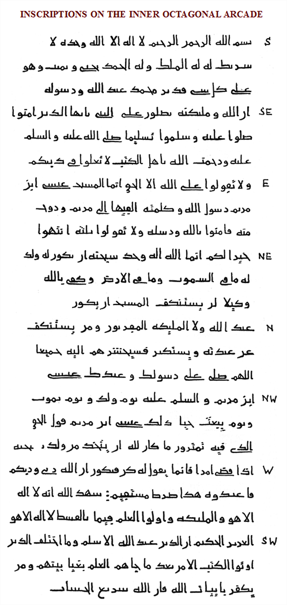 Inschrift 1 im Felsendom, Jerusalem